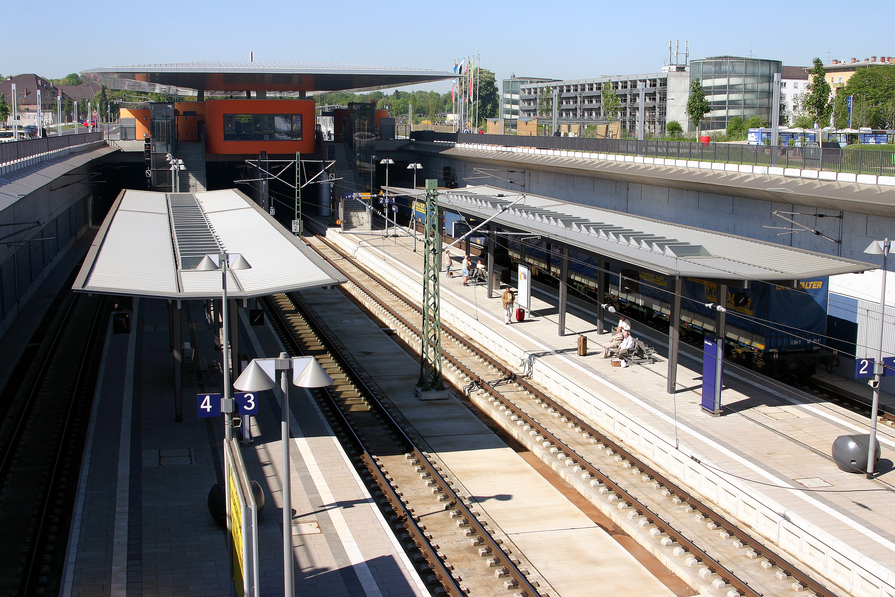 Bahnhof Neu-Ulm nach dem Umbau